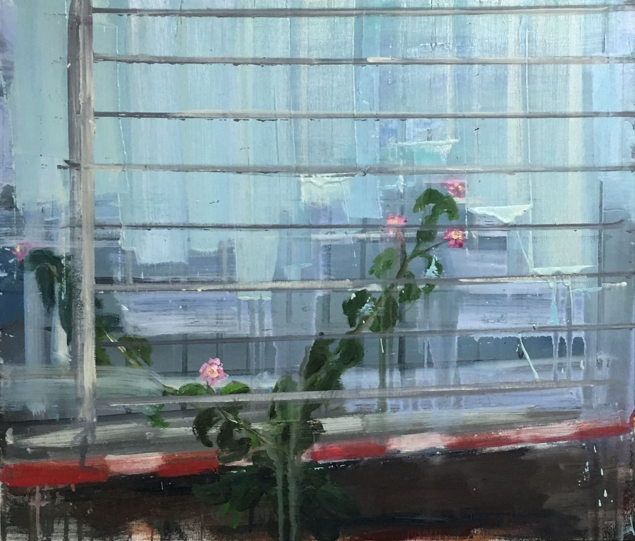 ציור של עופרי מרום.